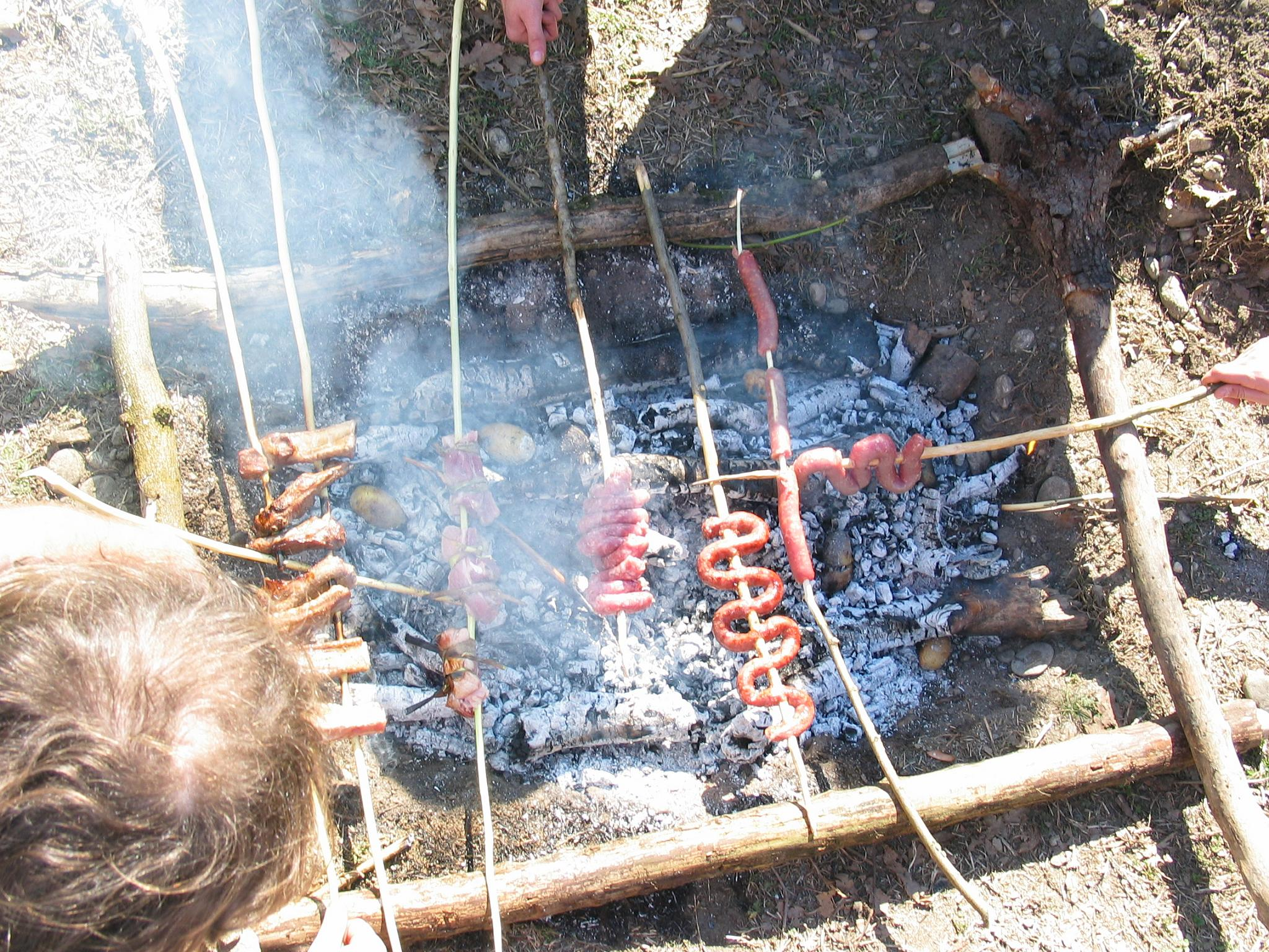 Cucina trappeur durante un'attività di un clan AGESCI